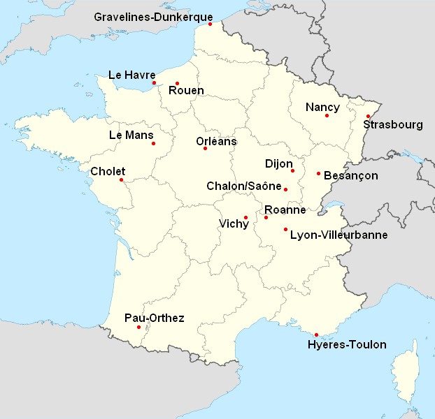 Clubs évoluant en Pro A 2008-2009